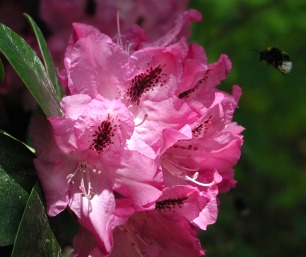 Różanecznik w Arboretum w Rogowie.